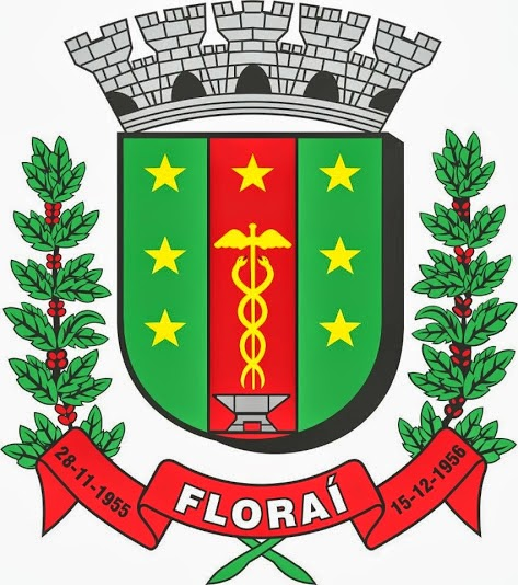 Brasão de armas do Município de Floraí